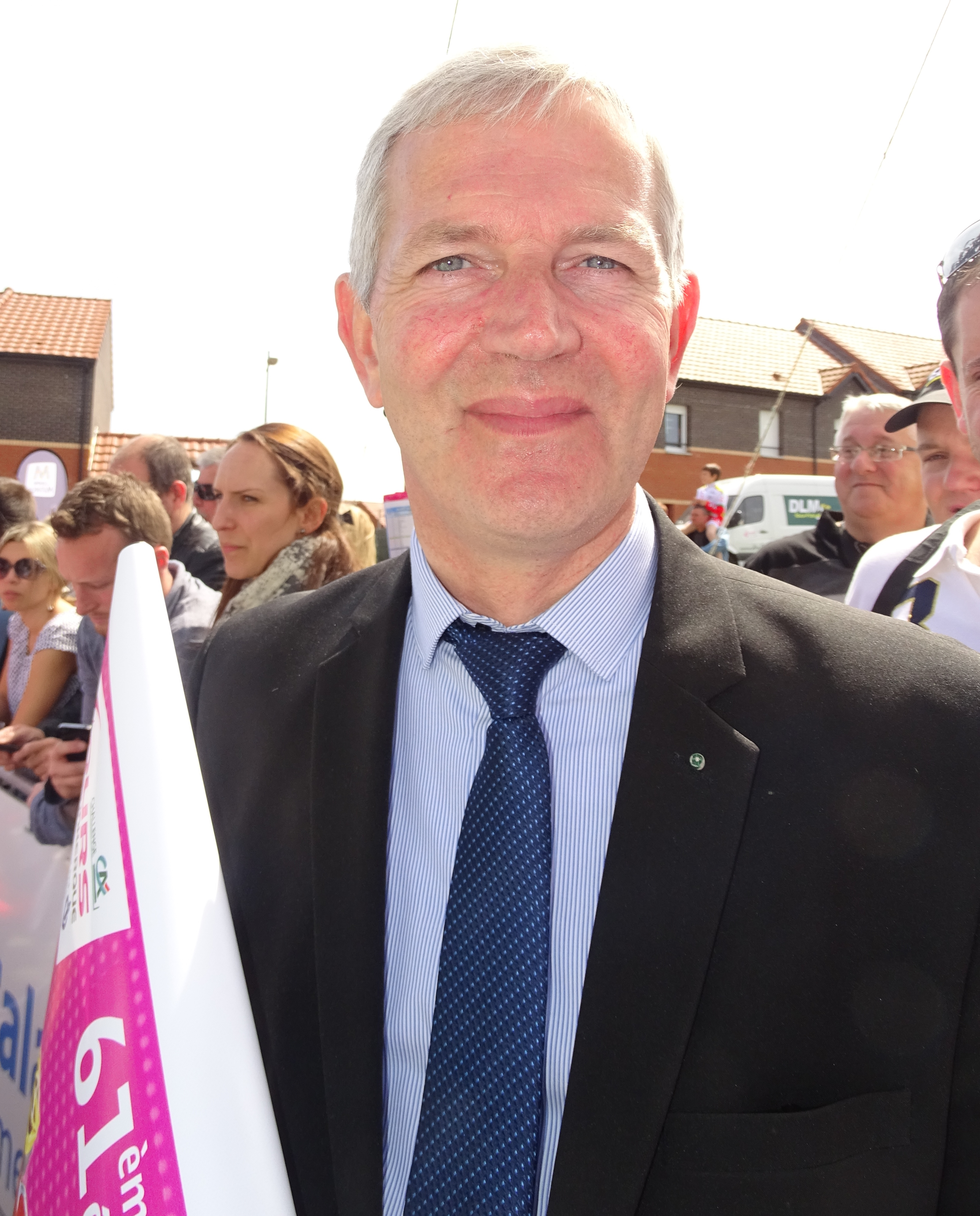 Reportage réalisé le vendredi 8 mai 2015 à l'occasion du départ de la troisième étape des Quatre jours de Dunkerque 2015 à Barlin, Pas-de-Calais, Nord-Pas-de-Calais, France. Depicted person: Michel Dagbert